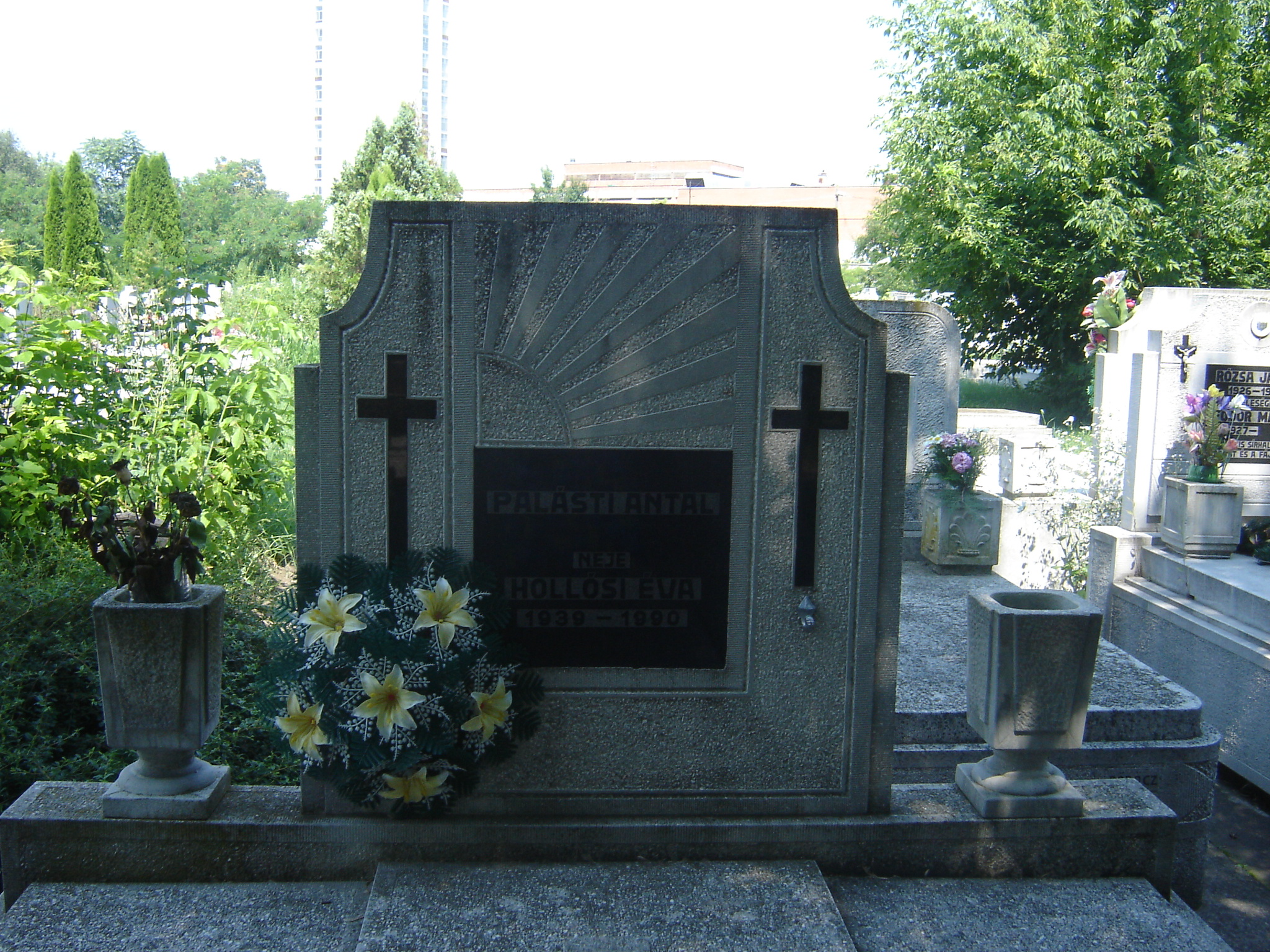 Szeged Alsóvárosi temető. Az eklektikus stílus szép példája. Negyed nap és annak sugarai vannak a síron.